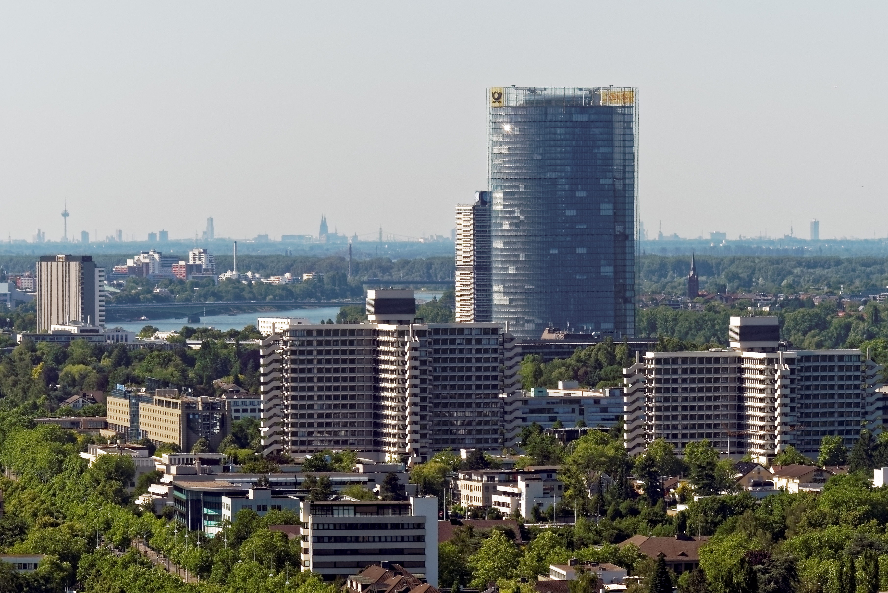 Blick von der Godesburg auf die Kreuzbauten und den Post Tower, im Hintergrund die Silhouette von Köln